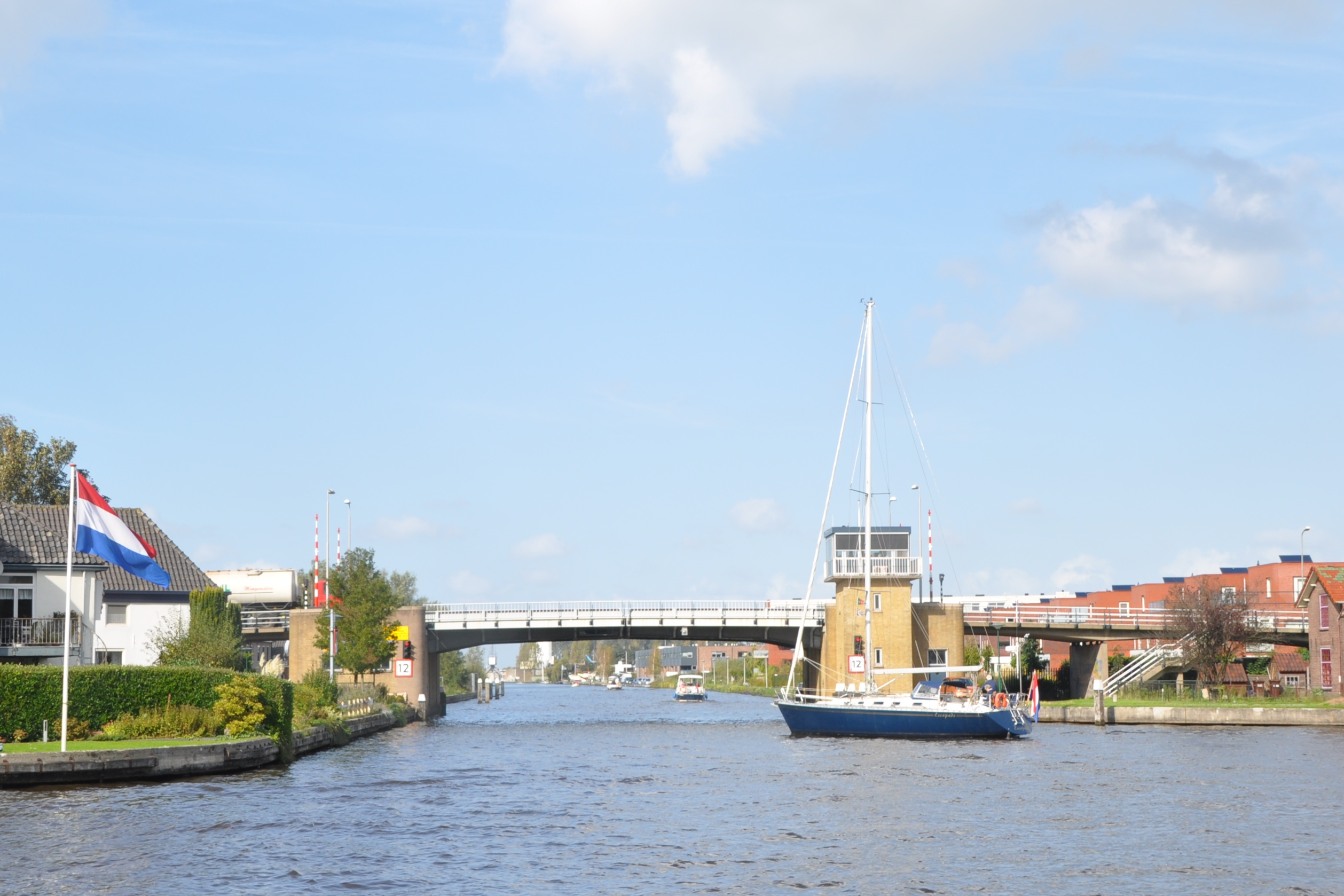 De 's-Molenaarsbrug in Alphen aan den Rijn